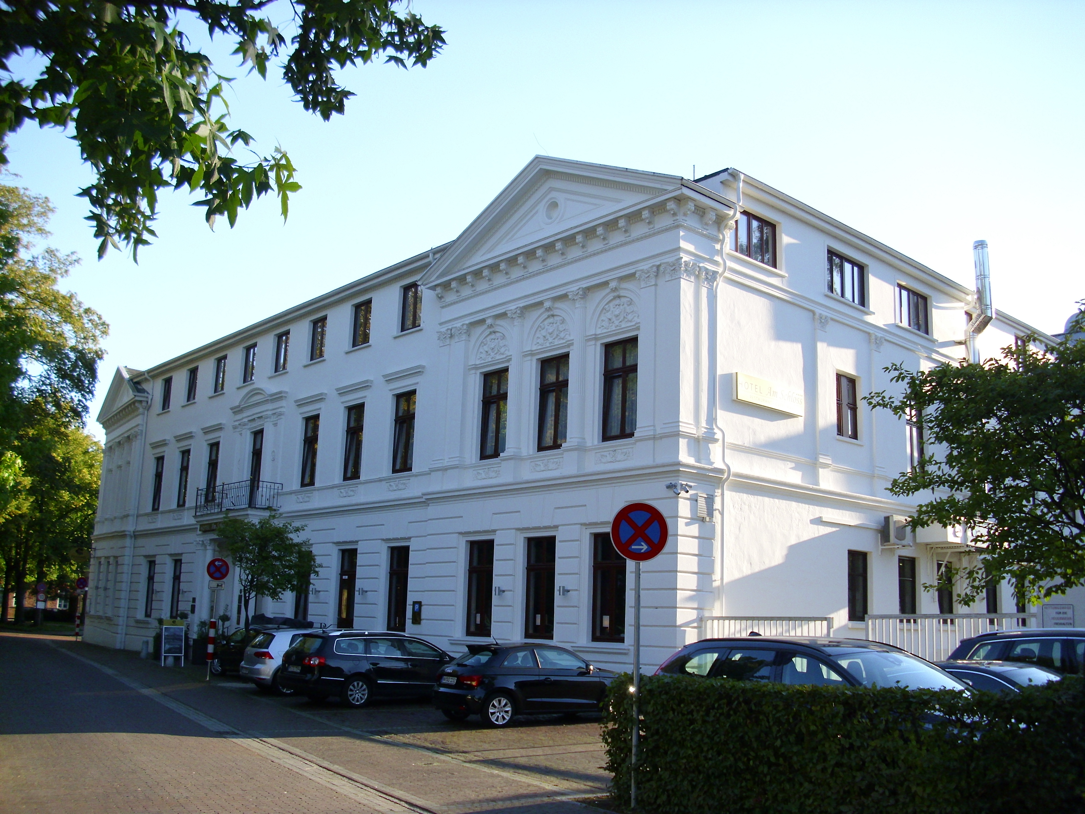 Das Hotel am Schloss (früher Piqueurhof) in Aurich, Ostfriesland, im September 2015